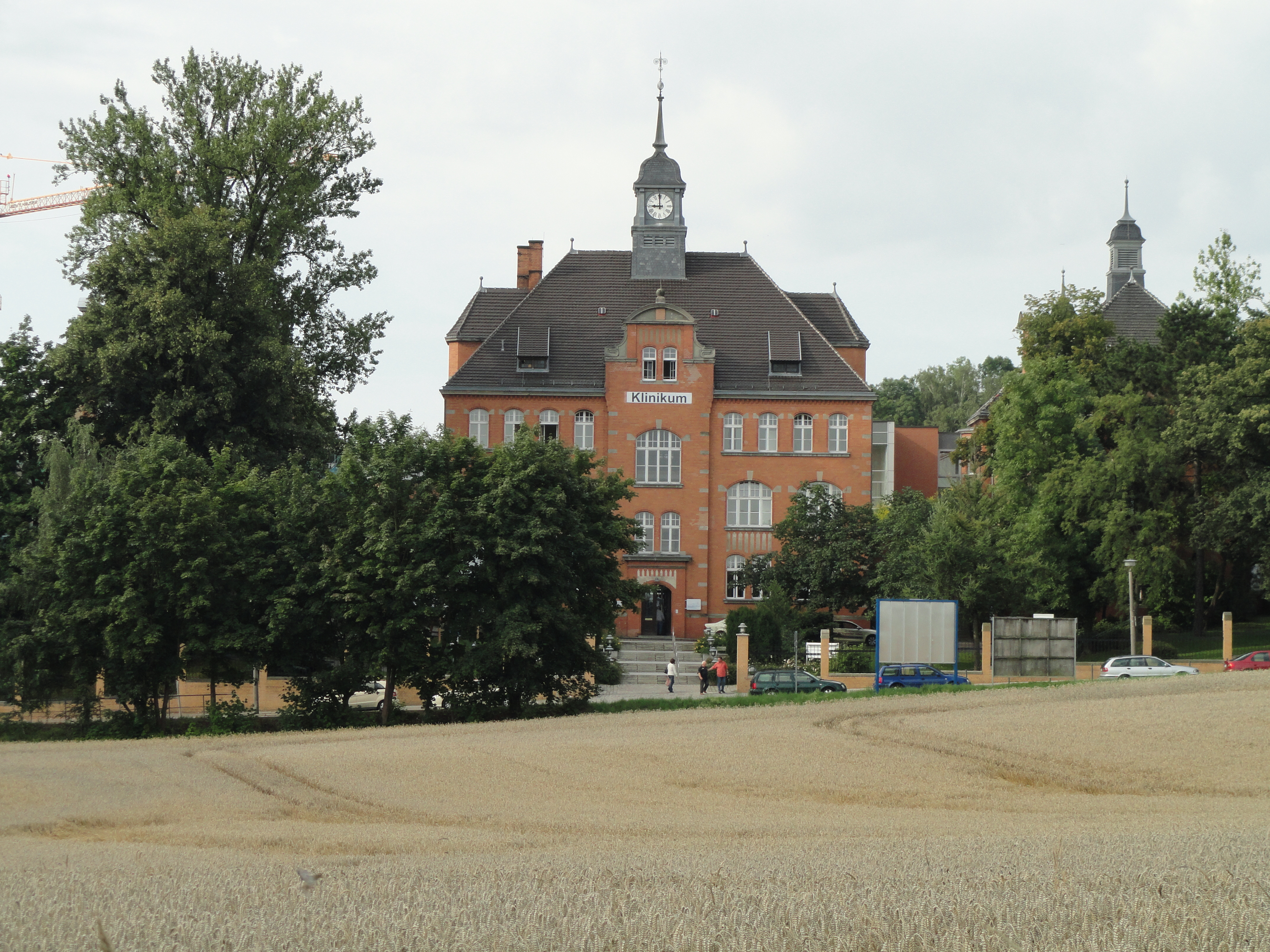 Hauptgebäude des Klinikums Görlitz an der Girbigsdorfer Straße